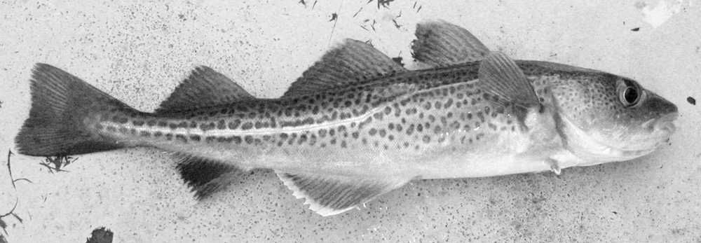 Petite morue d'environ 30 cm, sur un bateau de pêche, aux Îles-de-la-Madeleine